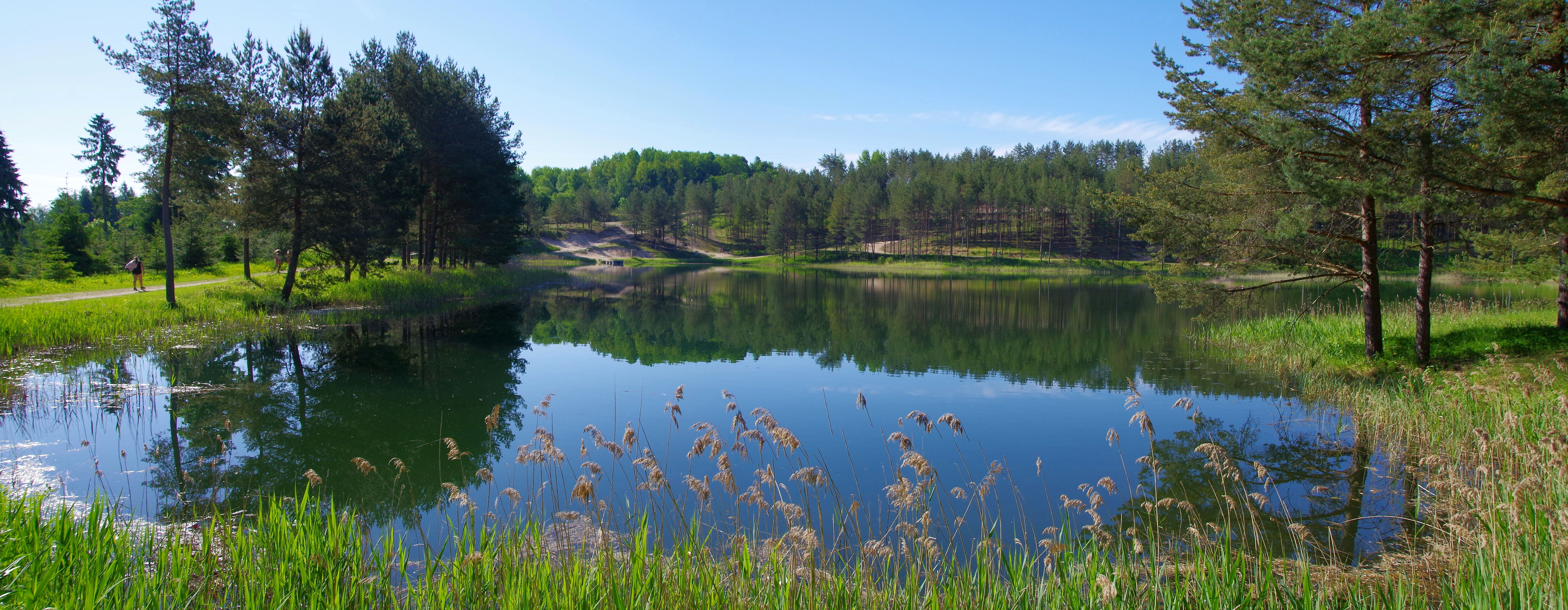 Palalinna järv on järv Tartu maakonnas Tartu vallas Sootaga külas.